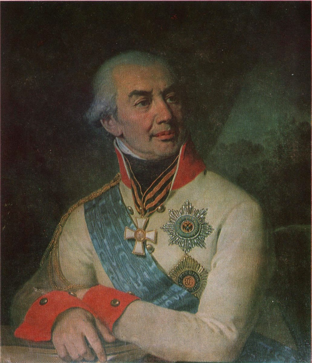 Portrait G.S. Volokonsky // Портрет князя Григория Семёновича Волконского. Киевский национальный музей русского искусства